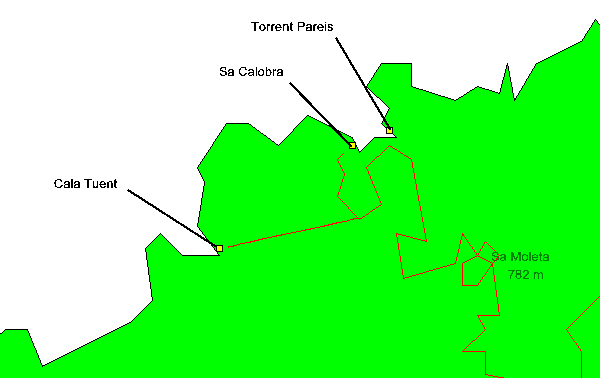 Skizze Playas Escorca